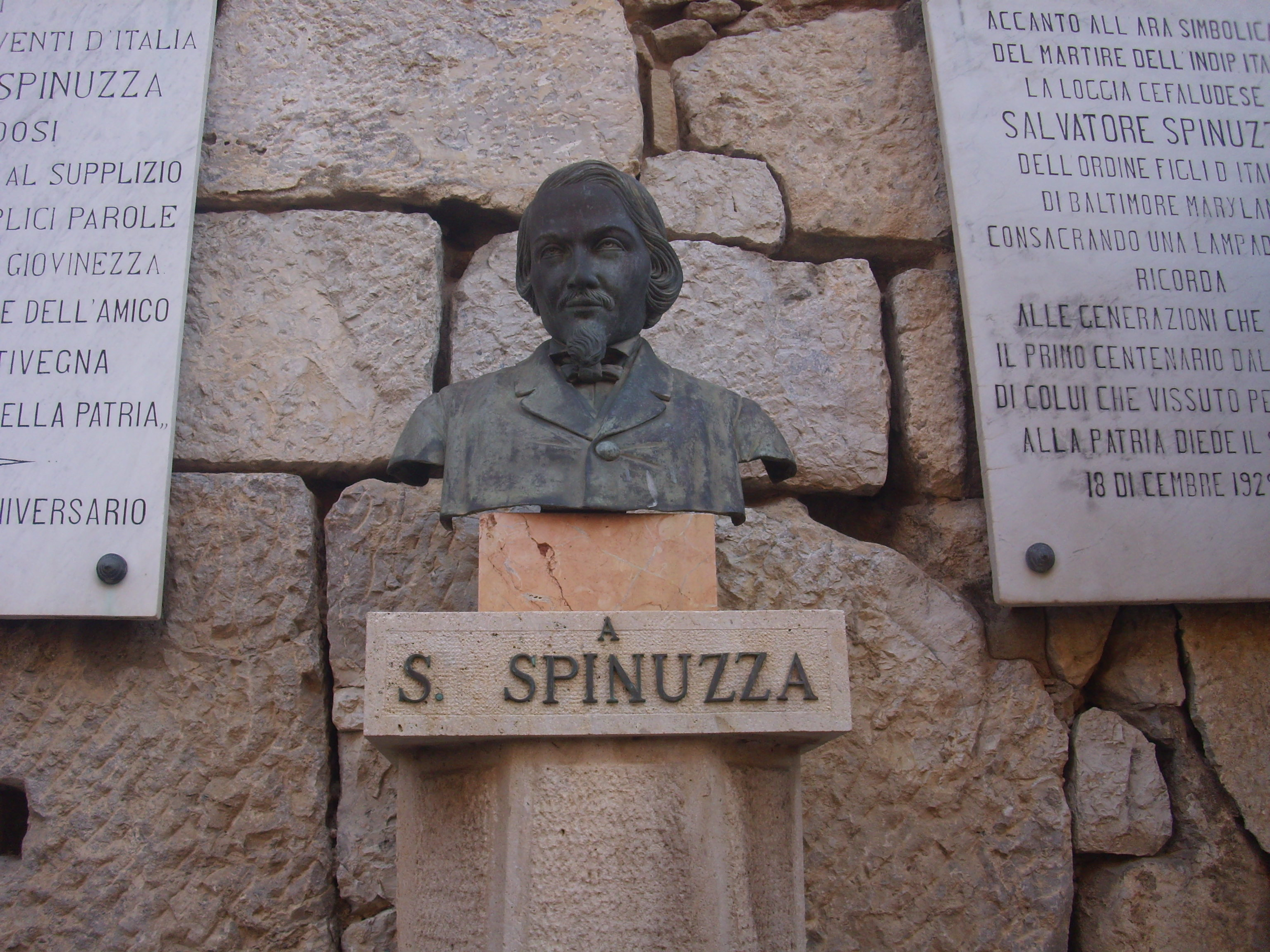 Statua di Salvatore Spinuzza, patriota italiano.